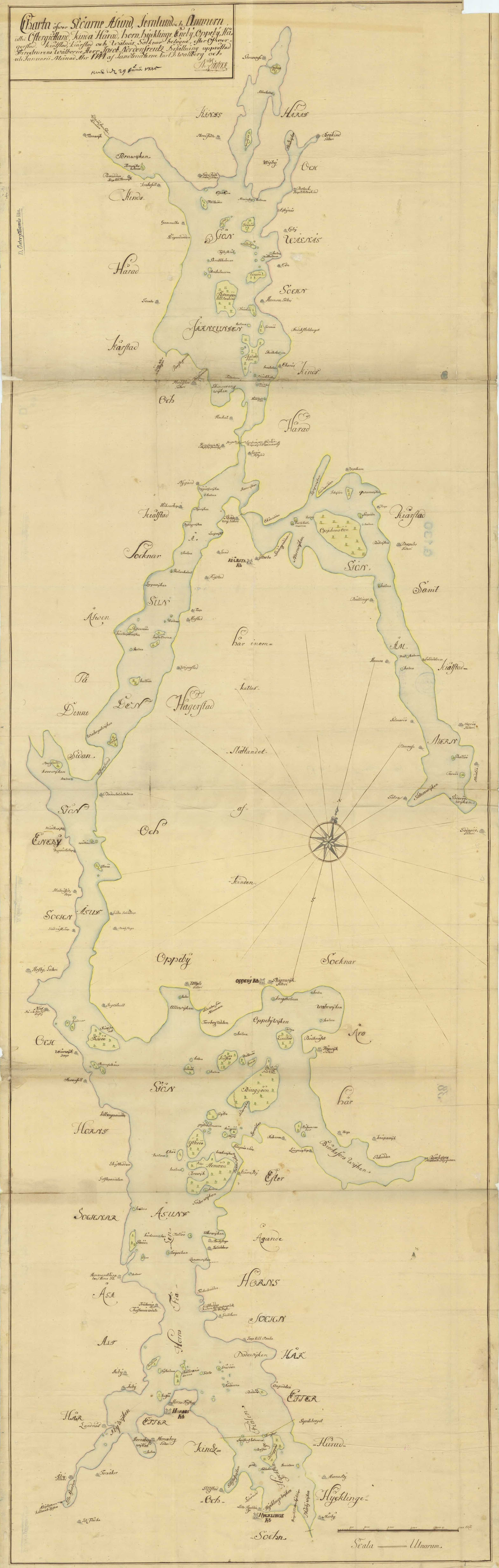 Karta över sjöarna Åsunden, Järnlunden och Ämmern av Nils Linbeck.